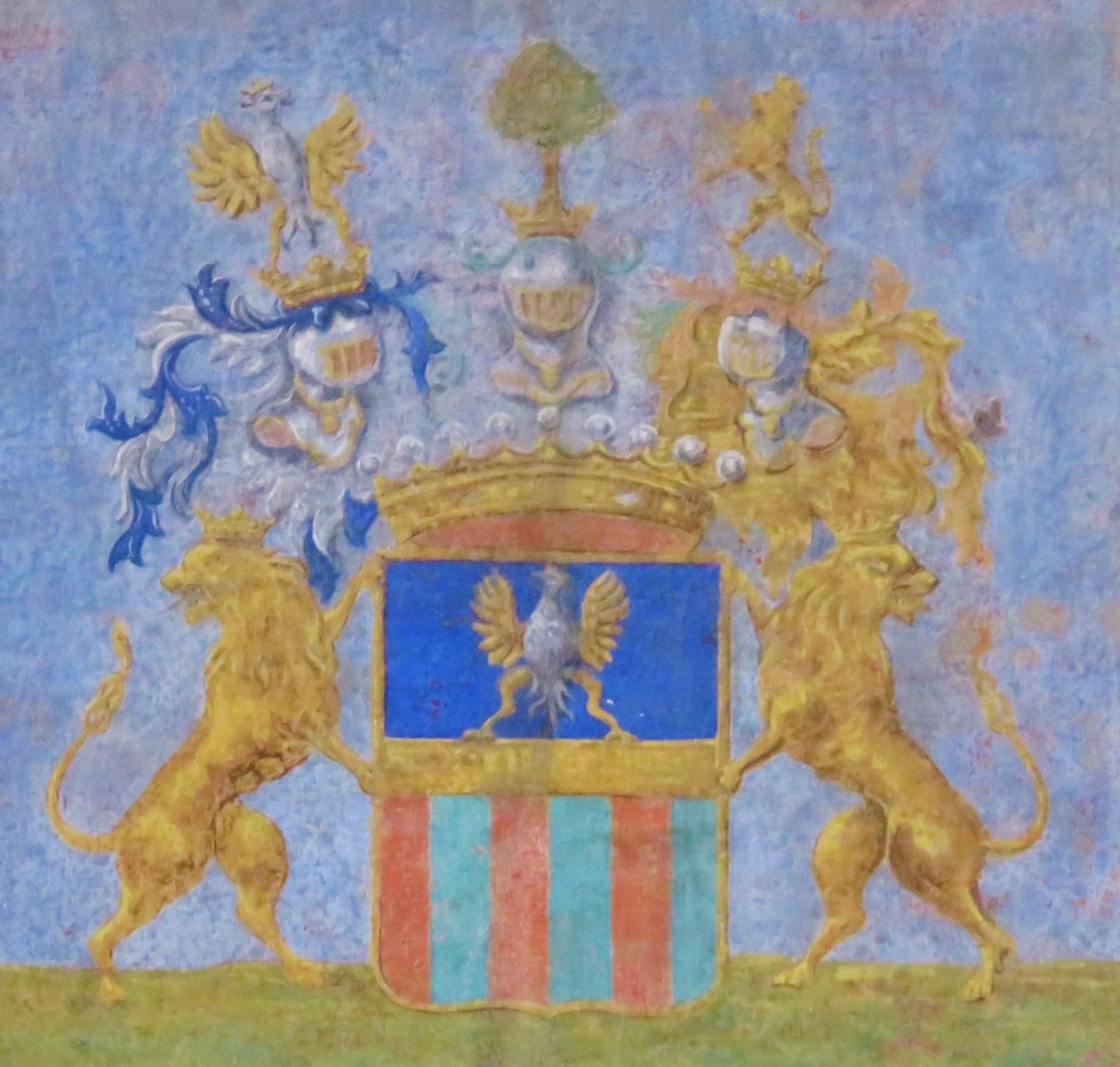 Questo è un particolare di una mia immagine già caricata precedentemente e che ho trasformato senza sostituire l'originale per evidenziare lo stemma nobiliare